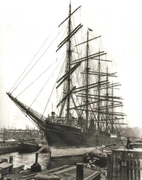 Vollschiff Preussen im Hafen - Old photo (historic Photo)